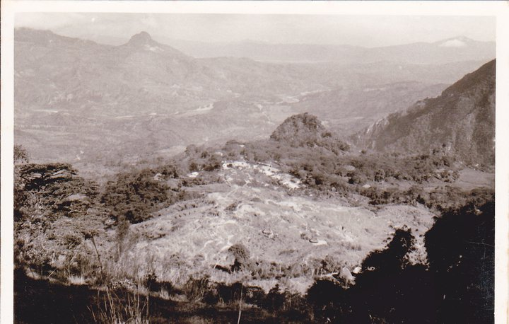 A linda povoação de Atsabe lá em baixo